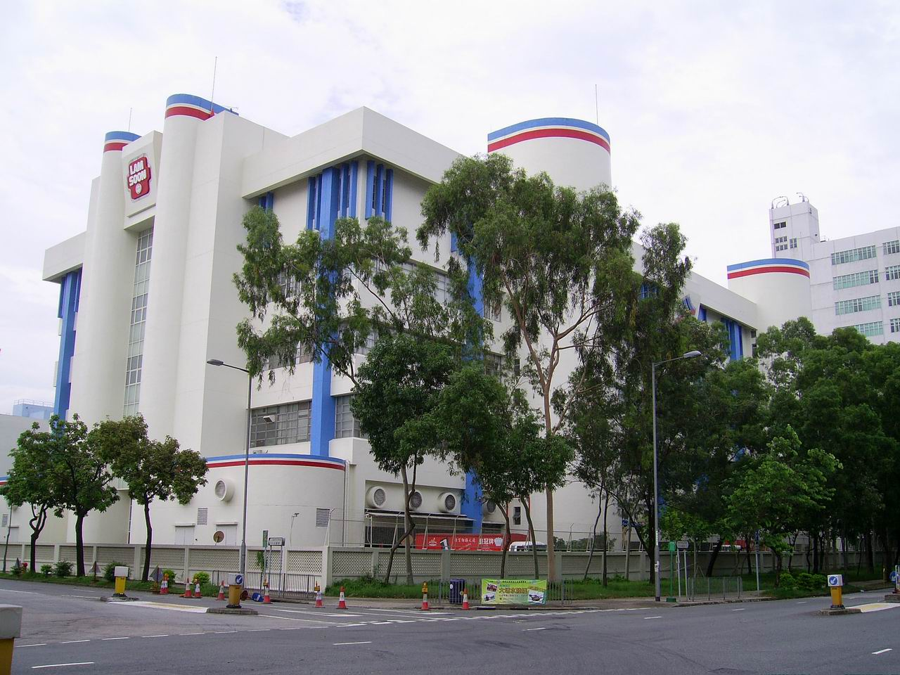 中文（香港）: 大埔工業園南順大廈